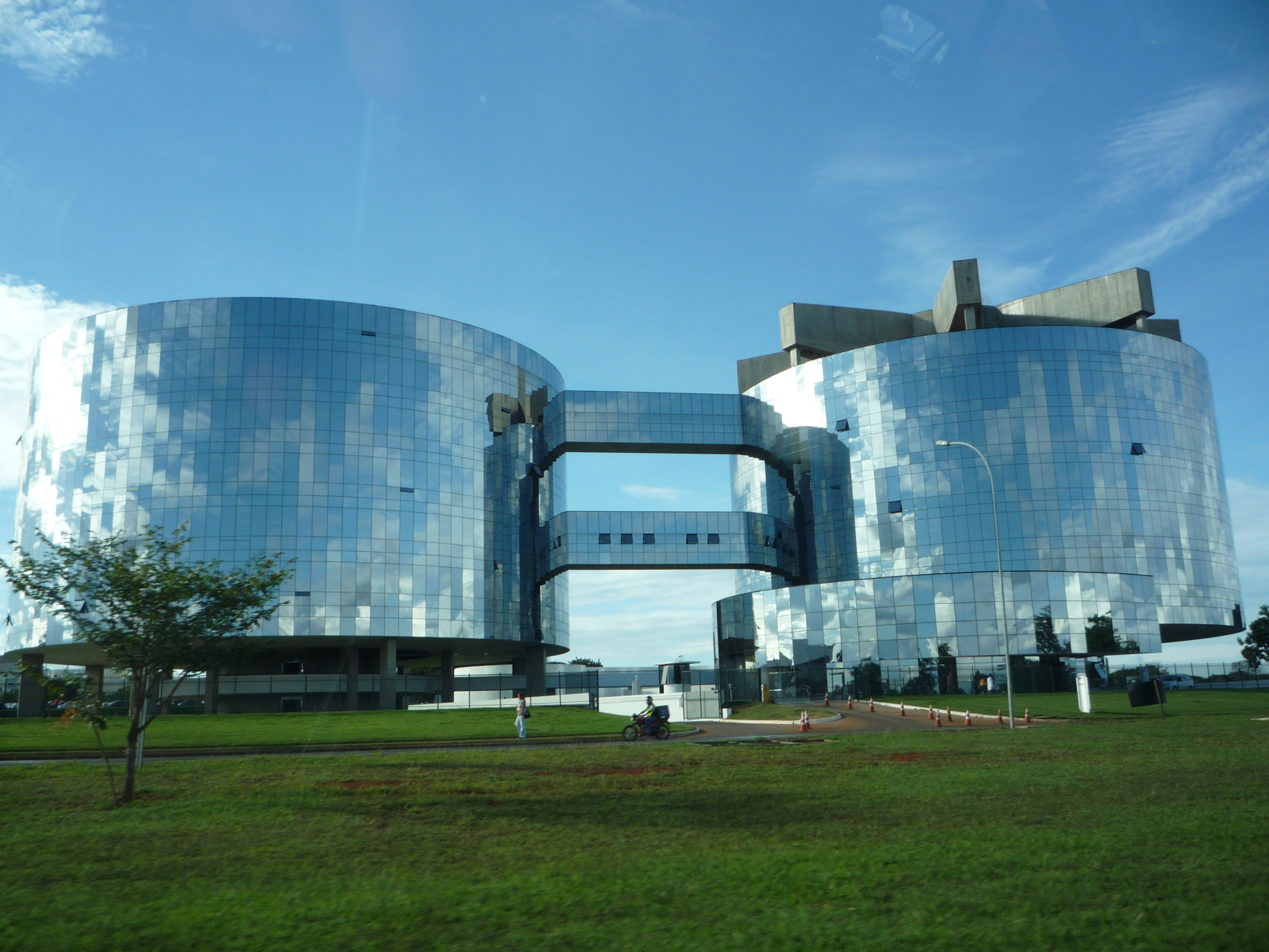 Sede de la Fiscalia General de la República de Brasil, en Brasilia.